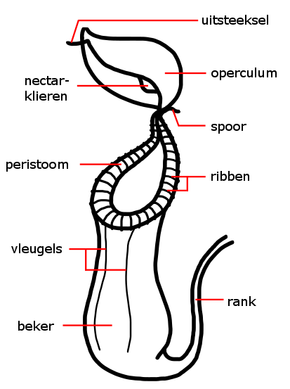 Morfologie van een Nepenthes-vangbeker